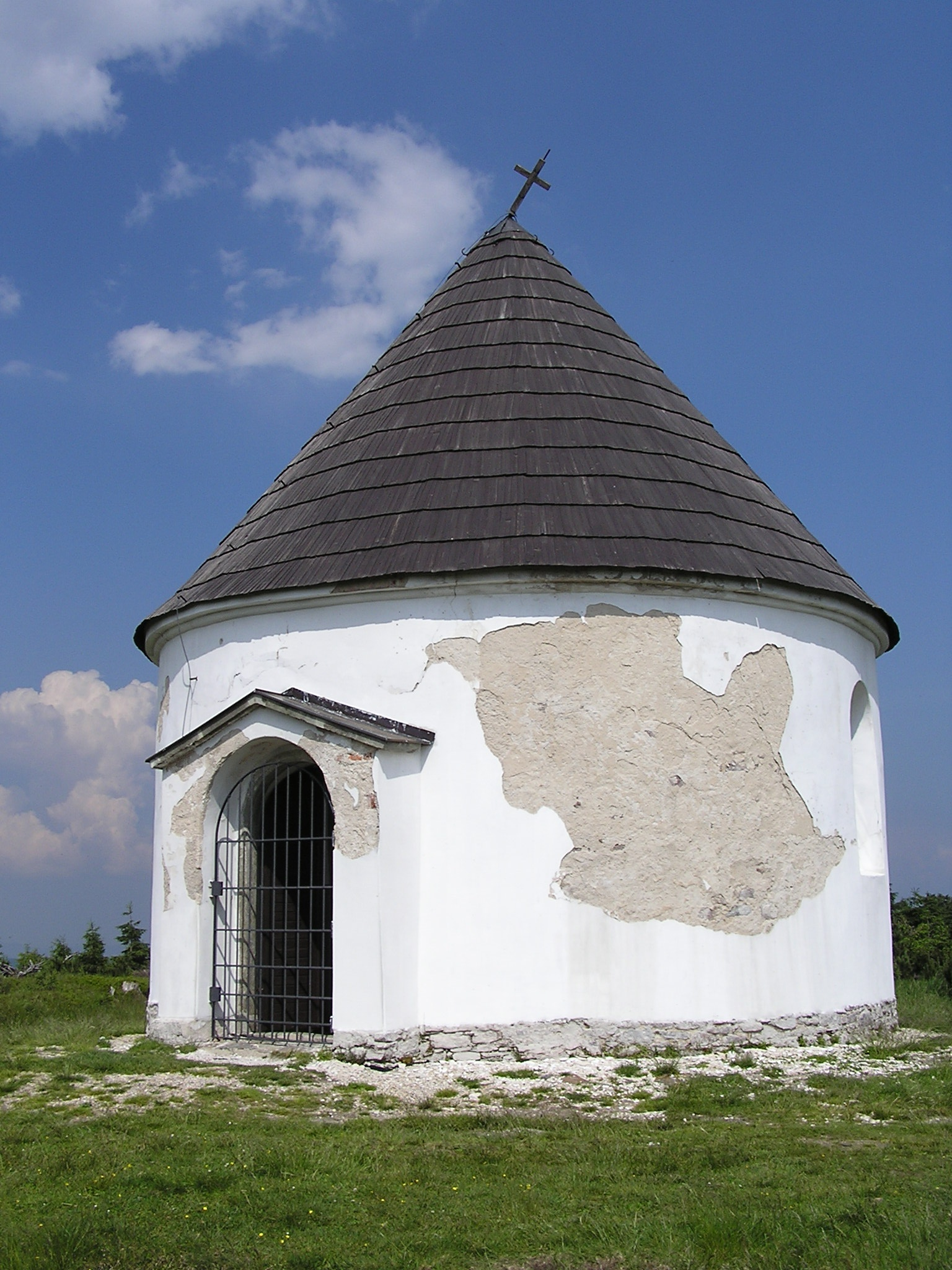 Kunštátská kaple na hřebeni Orlických hor